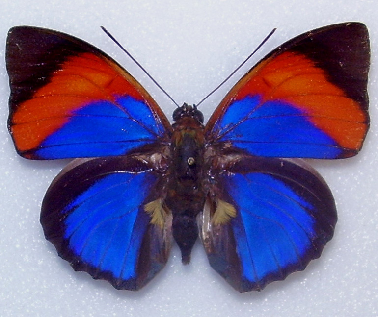 Agrias narcissus Staudinger ssp.tapajonus forma gilliani